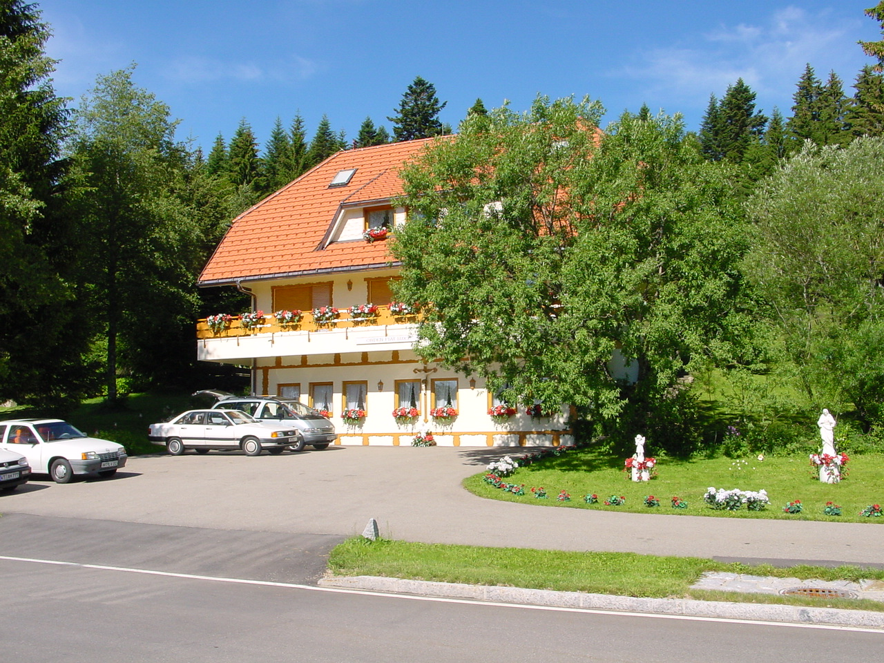 Hauptsitz von Fiat Lux in Ibach